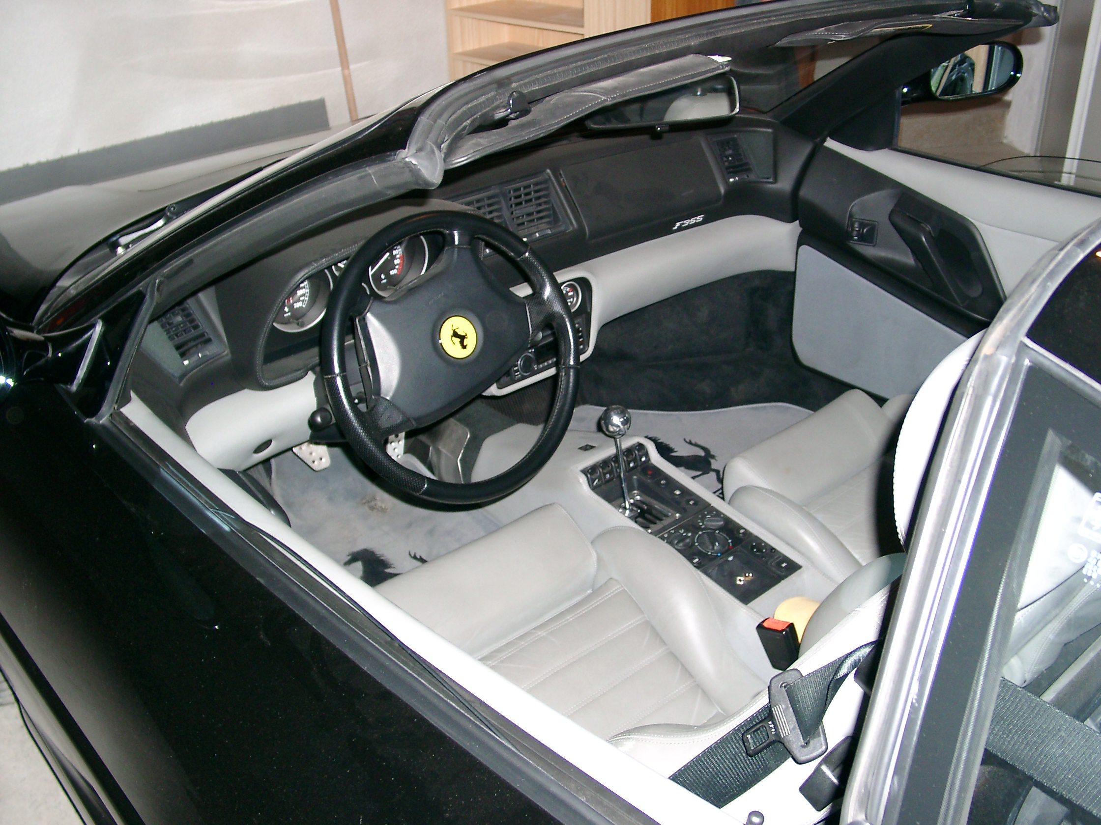 Ferrari F355 GTS inside